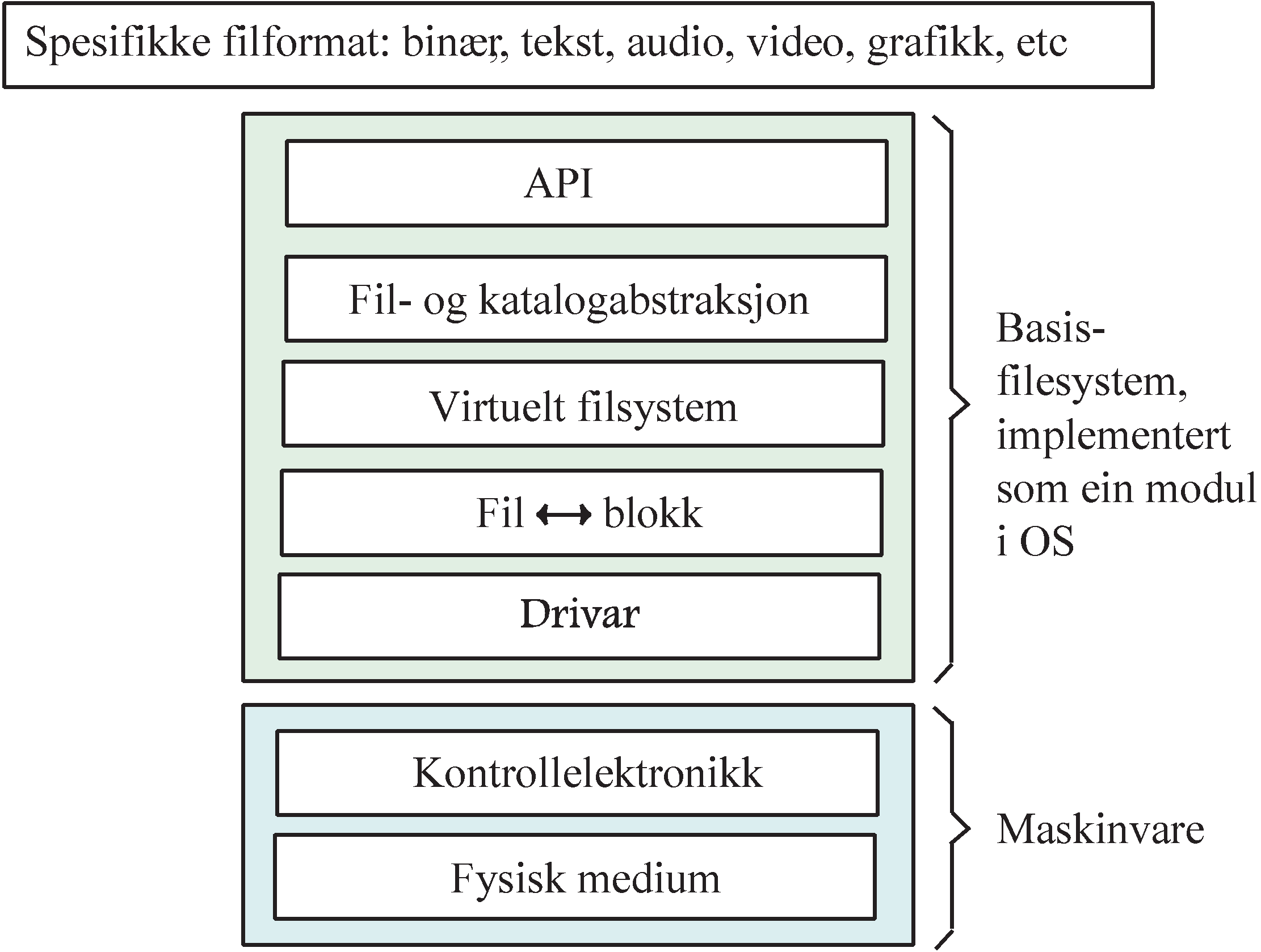 Blokkdiagram av filsystem